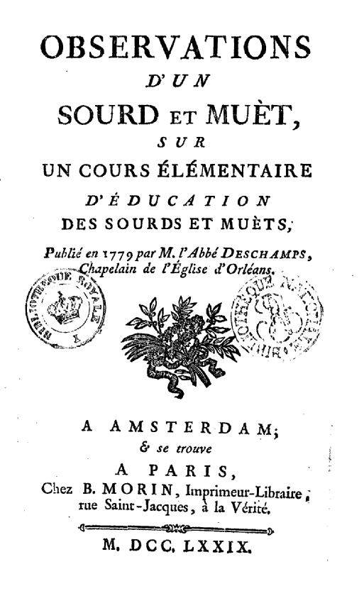 Titre : Observations d'un sourd et muèt, sur un cours élémentaire d'éducation des sourds et muèts, publié en 1779 par M. l'abbé Deschamps, chapelain de l'église d'Orléans Auteur : Desloges, Pierre (1747-18..?) Éditeur : A Amsterdam ; & se trouve a Paris, chez B. Morin, imprimeur-libraire, rue Saint-Jacques, à la Vérité. M. DCC. LXXIX Date d'édition : 1779 Contributeur : Deschamps, Claude François (1745-1791). Éditeur scientifique Type : monographie imprimée Langue : Français Format : 6-13-[1 bl.]-66 p. ; in-12 Droits : domaine public Identifiant : ark:/12148/bpt6k749465 Source : Bibliothèque nationale de France, département Littérature et art, X-6027 Relation : Provenance : bnf.fr Date de mise en ligne : 15/10/2007